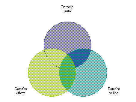 Círculos de Eduardo García Máynez vigente, positivo y natural , adaptación de Bernardo Bolaños